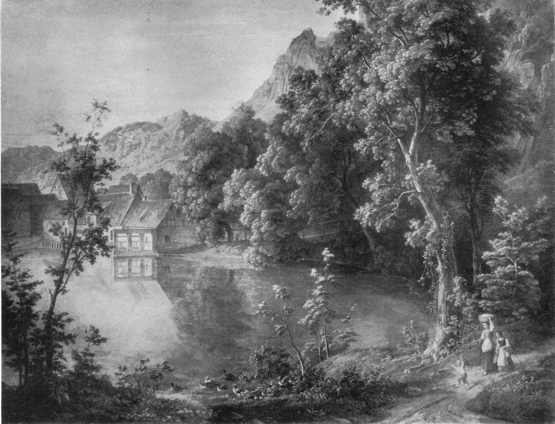 Der Blautopf von Julius Steinkopf, wohl um 1840, Öl auf Leinwand, 80 x 140 cm, Privatbesitz.